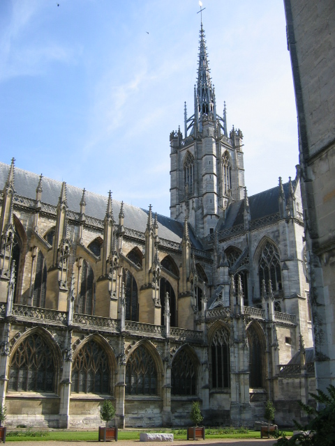 Cathédrale d'Evreux, Eure, Haute-Normandie : nef, tour-lanterne vues du sud